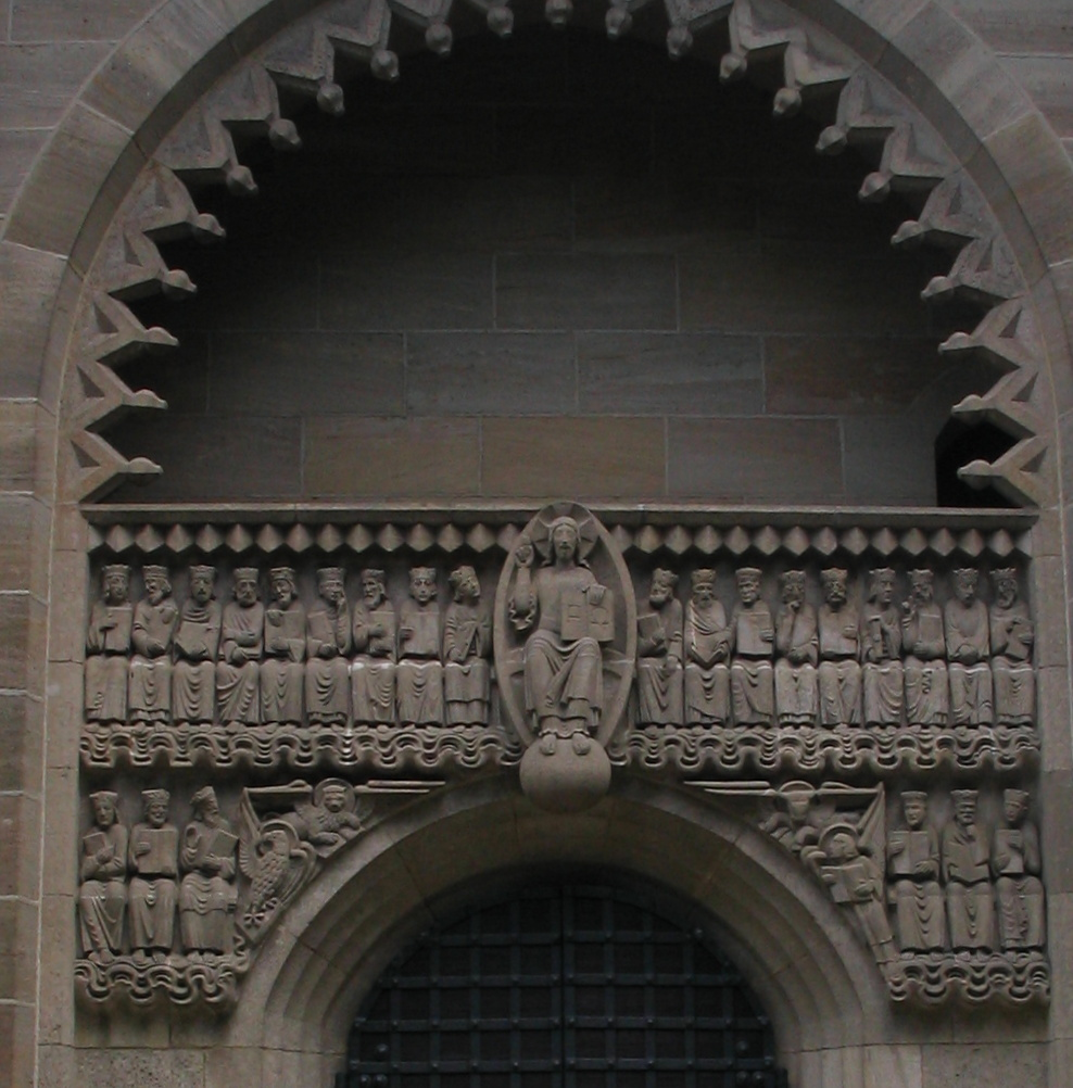 St. Laurentiuskirche, Westportal. Detail: Christus Pantokrator und die 24 Ältesten, vonen denen einige Neuendettelsauer Geistliche darstellen. 1931 vom Bildhauer Markus Heinlein gefertigt.